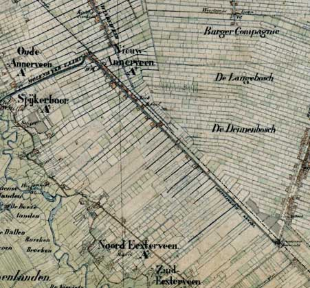 De Anner en Eextervenen, direct na de vervening, fragment van een topografische militaire kaart uit 1830-1850